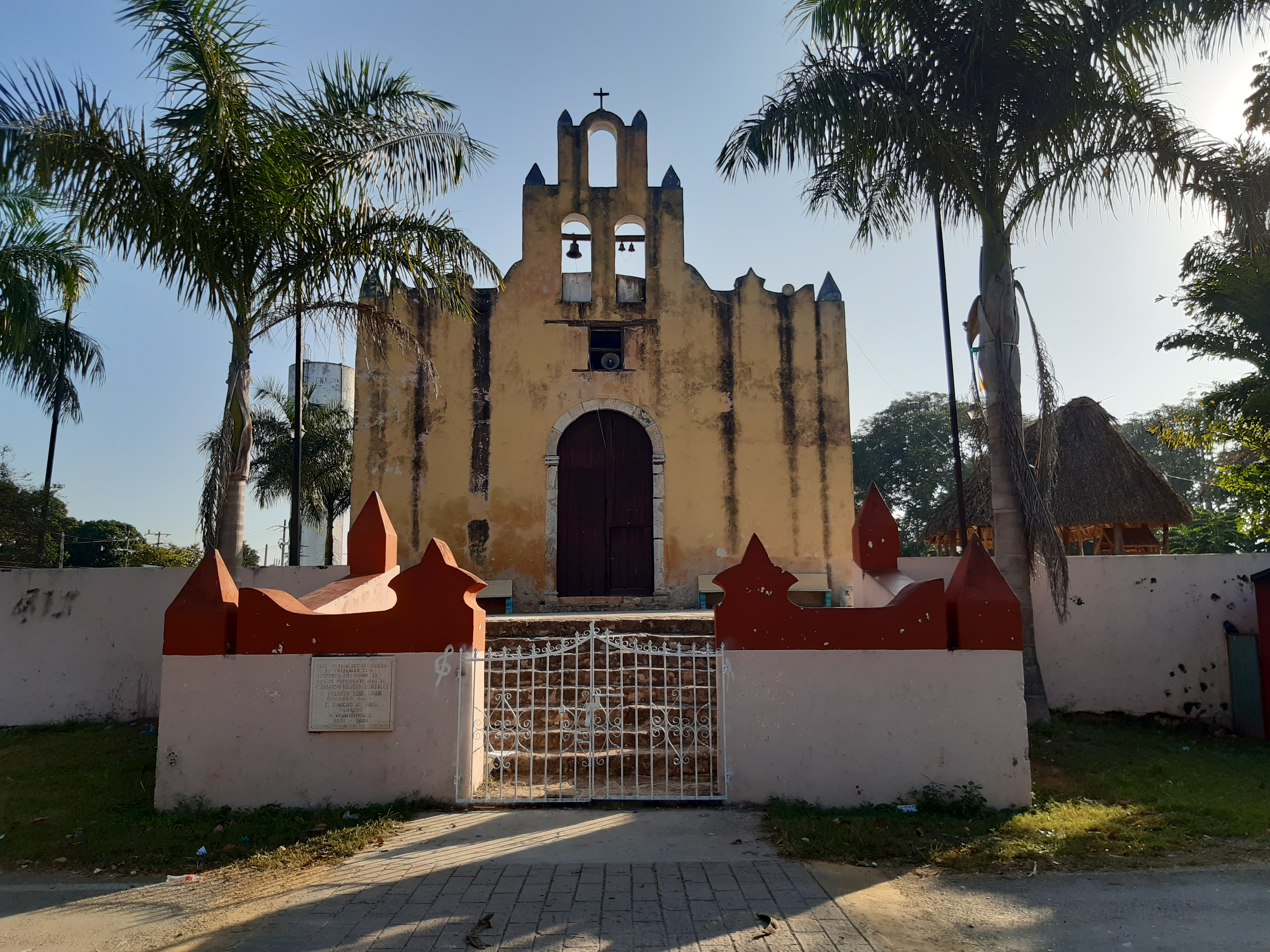 Iglesia en Hunukú, Temozón